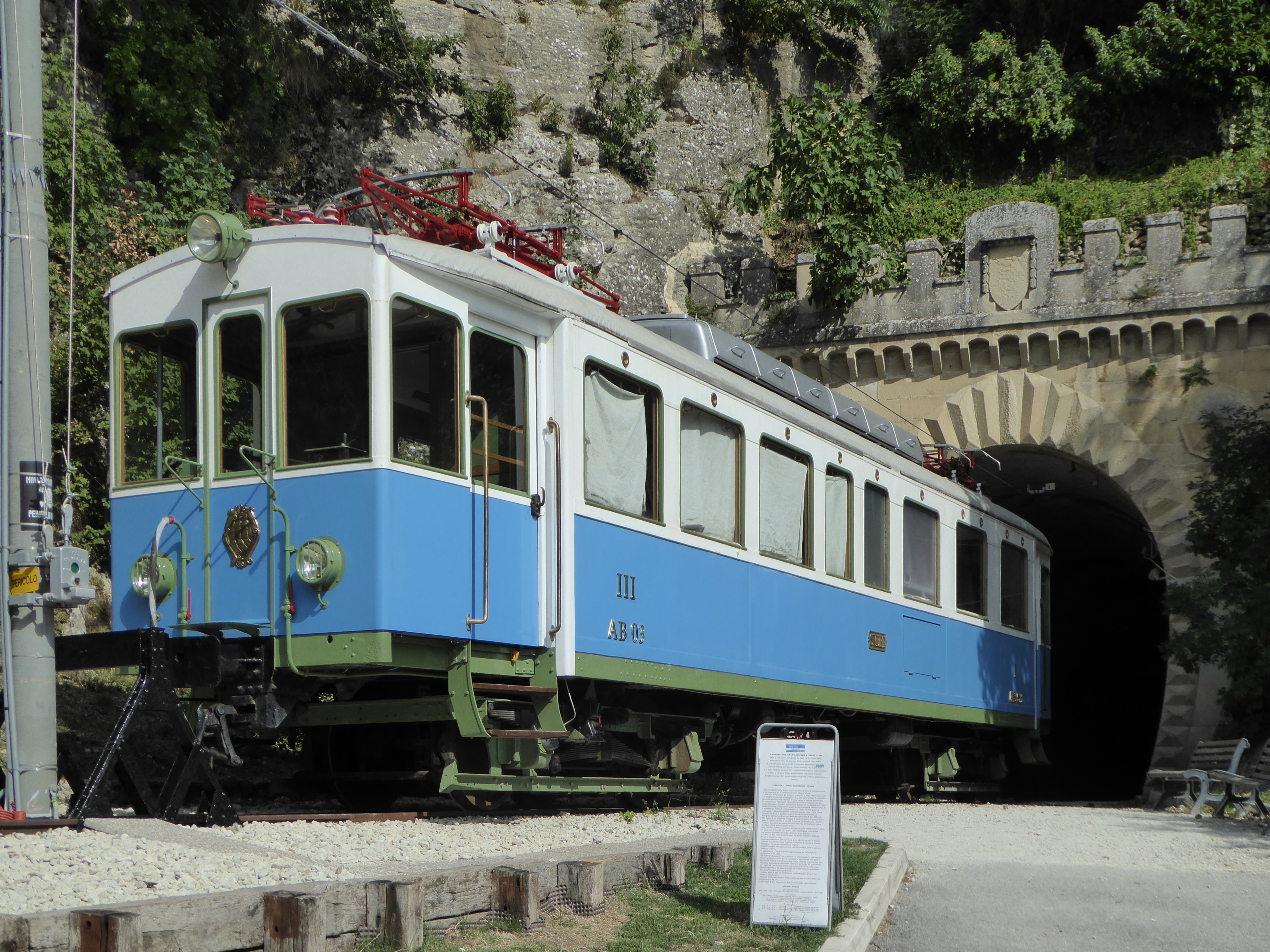 Triebwagen der früheren Schmalspurbahn nach San Marino, ausgestellt vor dem Montale-Tunnel.